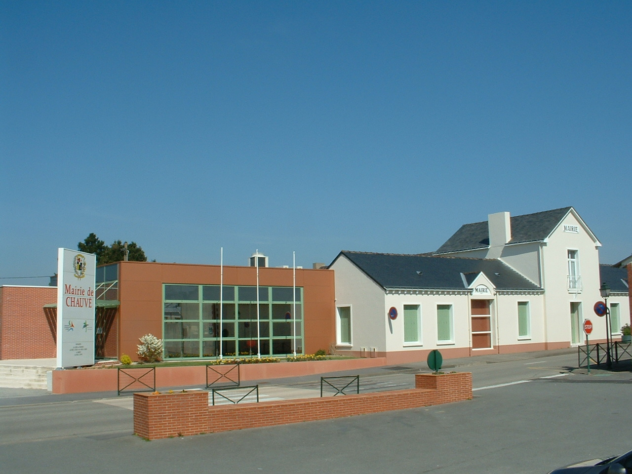 Chauvé (France) - Hôtel de ville